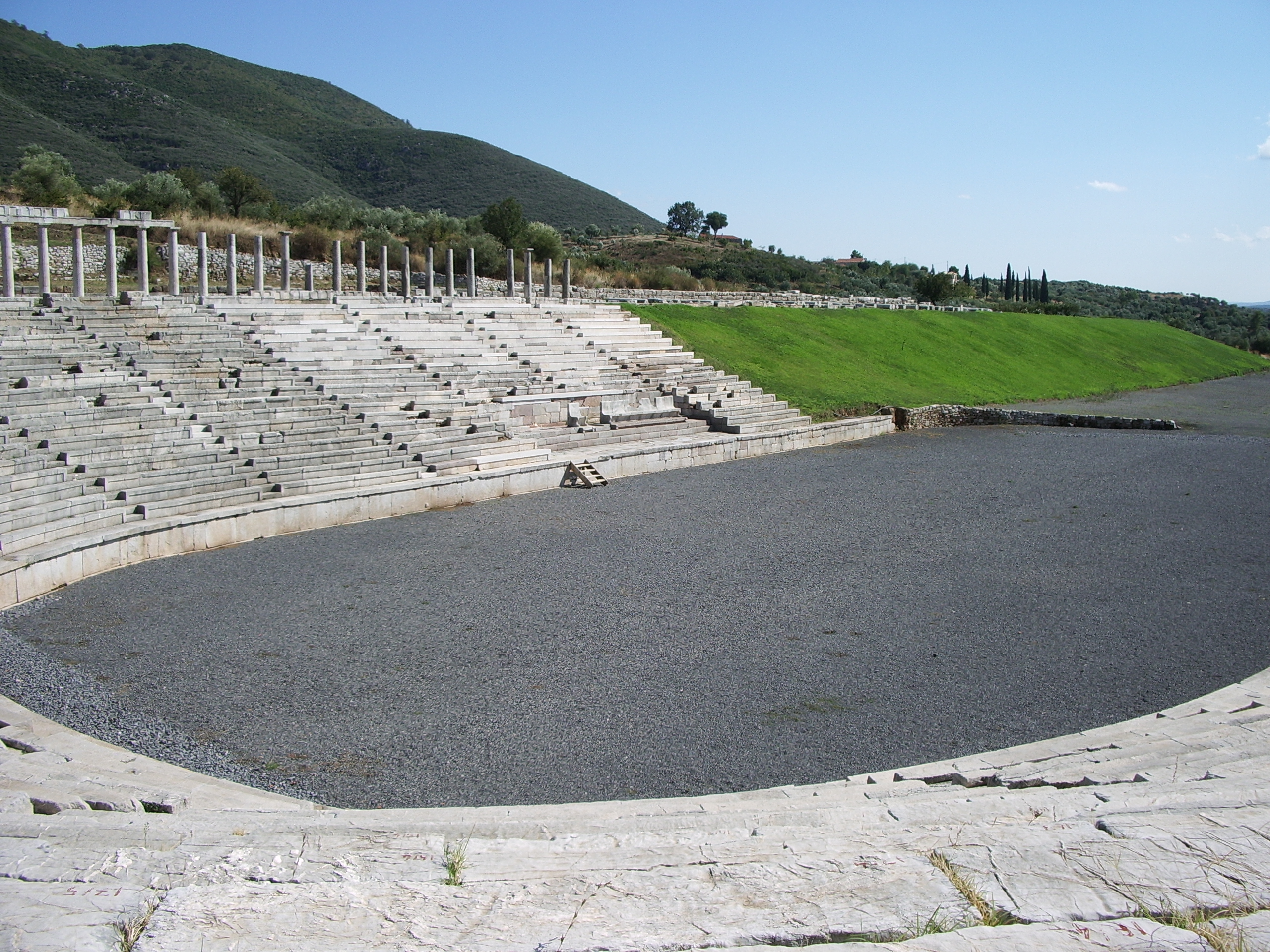 Antikes Stadion in Messene